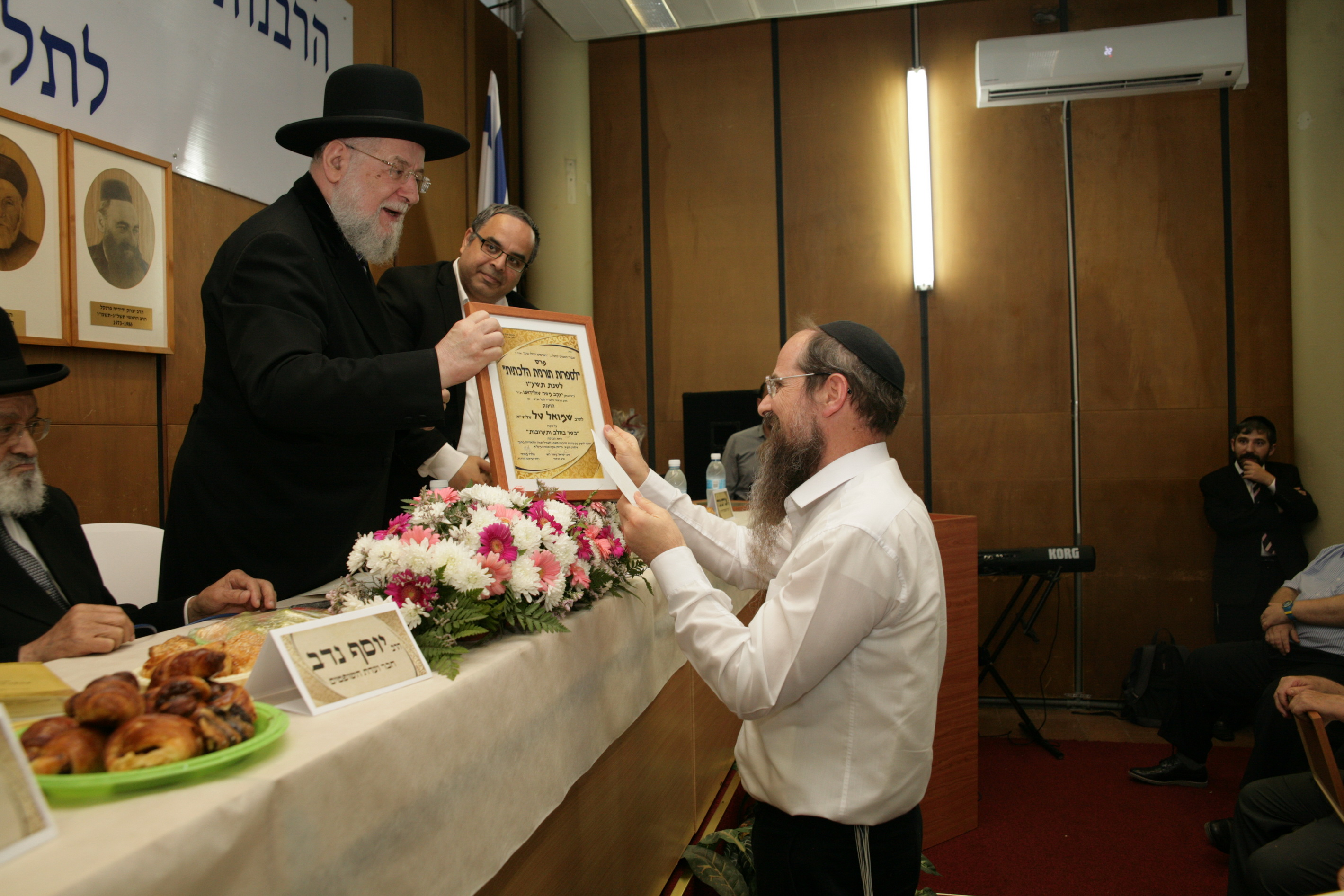 הרב שמואל טל מקבל את פרס הרב טולידנו, מאת הרב ישראל מאיר לאו, בטקס הענקת פרסי המועצה הדתית תל אביב יפו תשע"ו